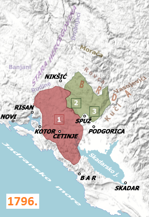 1796.godine: 1. Stara Crna Gora; 2. Bjelopavlići i 3. Piperi.